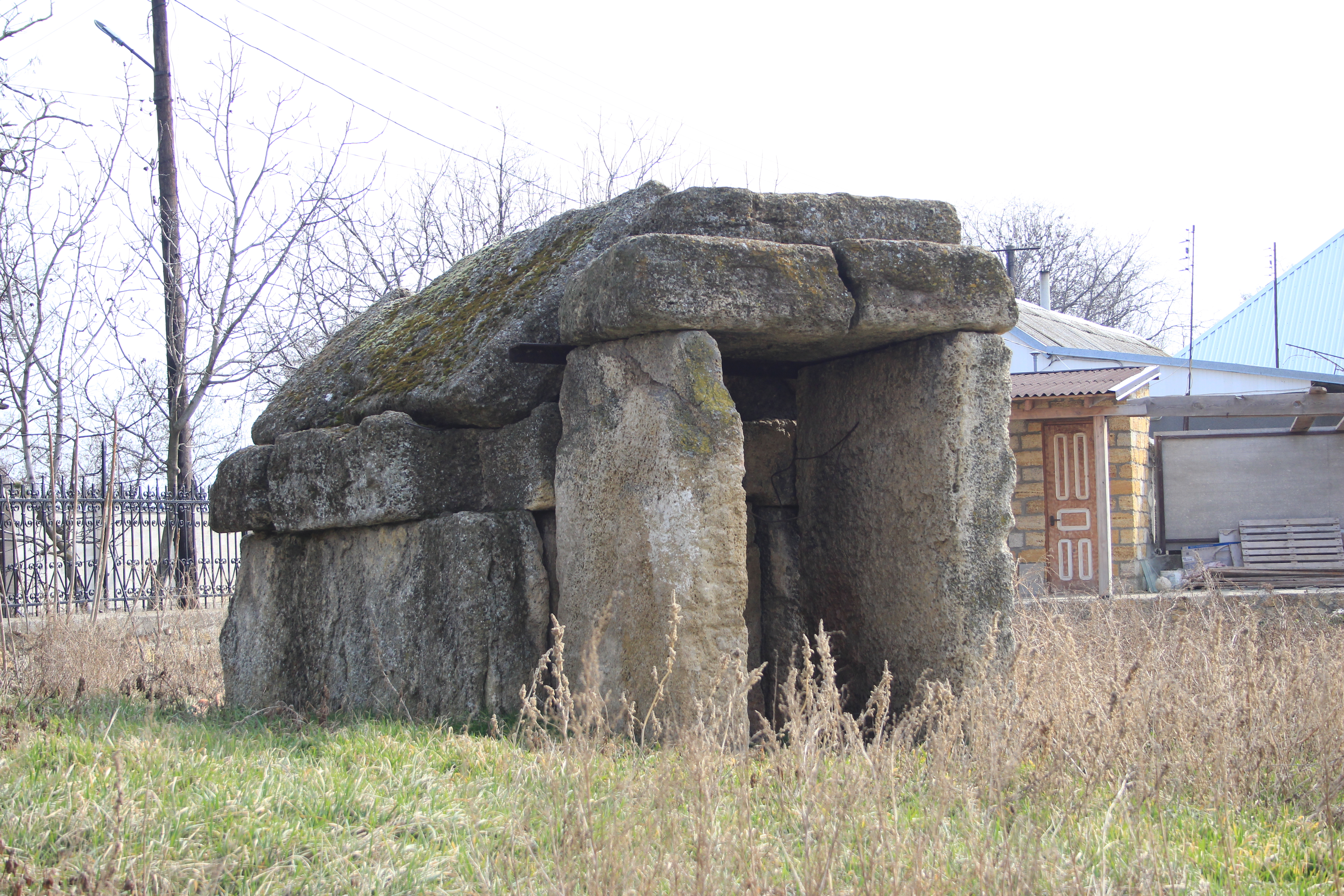 Церква Успіння Пресвятої Богородиці (вірменська), Білгород-Дністровський, вул. Кутузова, 1